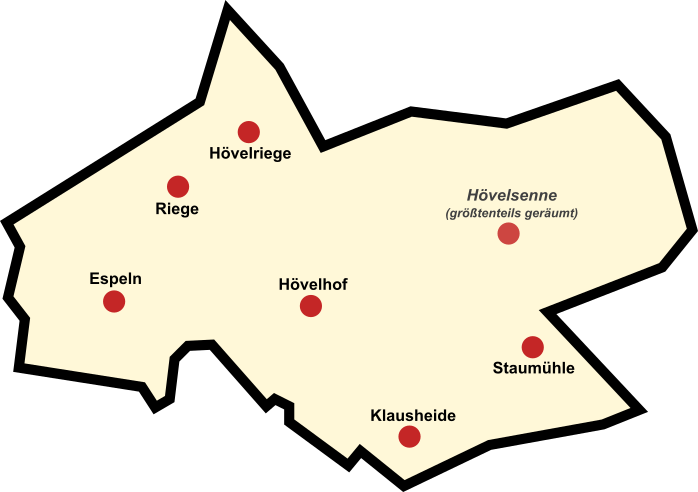 Lage der Ortsteile der Gemeinde Hövelhof